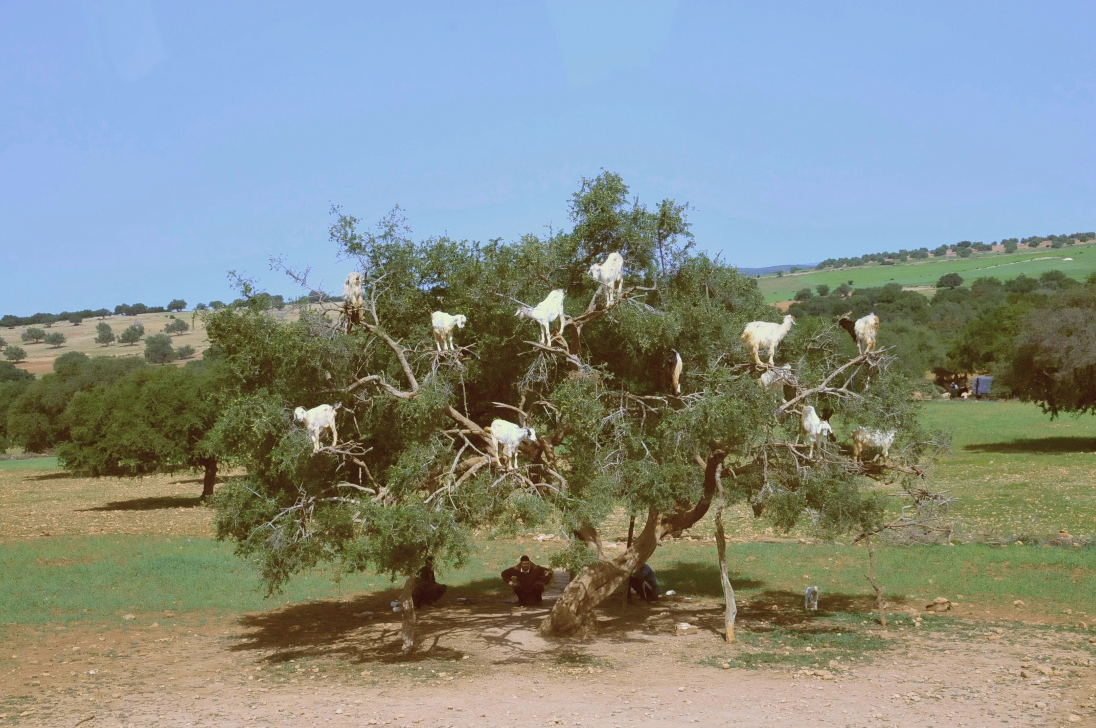 Ziegen auf einem Arganbaum in der Region Marrakesch